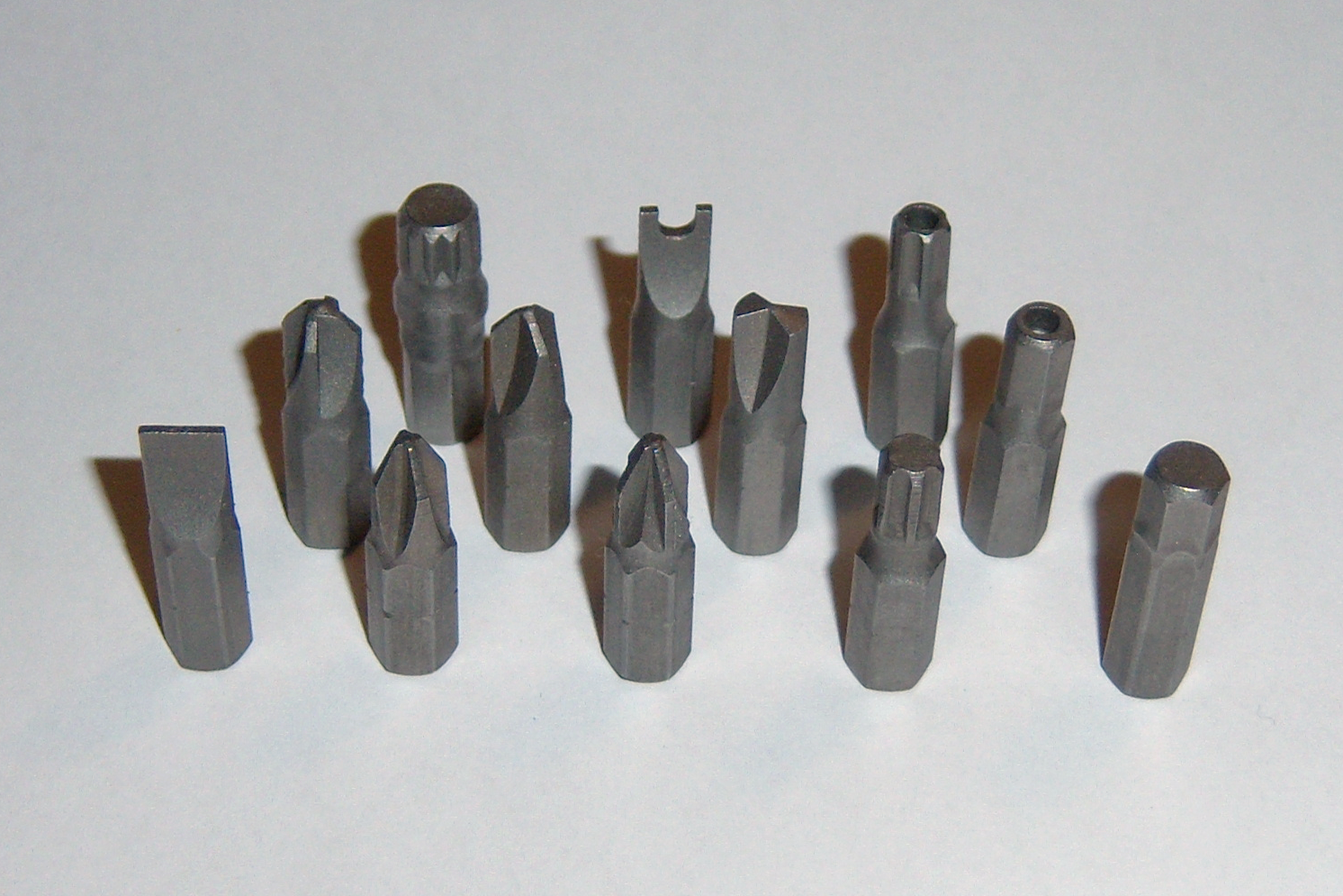 Werkzeugbits: Vorne (ltr): Slotted/Schlitz 6,5 mm; Phillips PH2; Pozidriv PZ2; Torx T30; Inbus/Allen 6 mm; Mitte (ltr): Torq-Set 10; Tri-Wing 4; One-Way 3; Inbus/Allen (Tamper-resistant) 5 mm; Hinten (ltr): Triple Square/XZN M8; Spanner Head 10; Torx (Tamper-resistant) T30